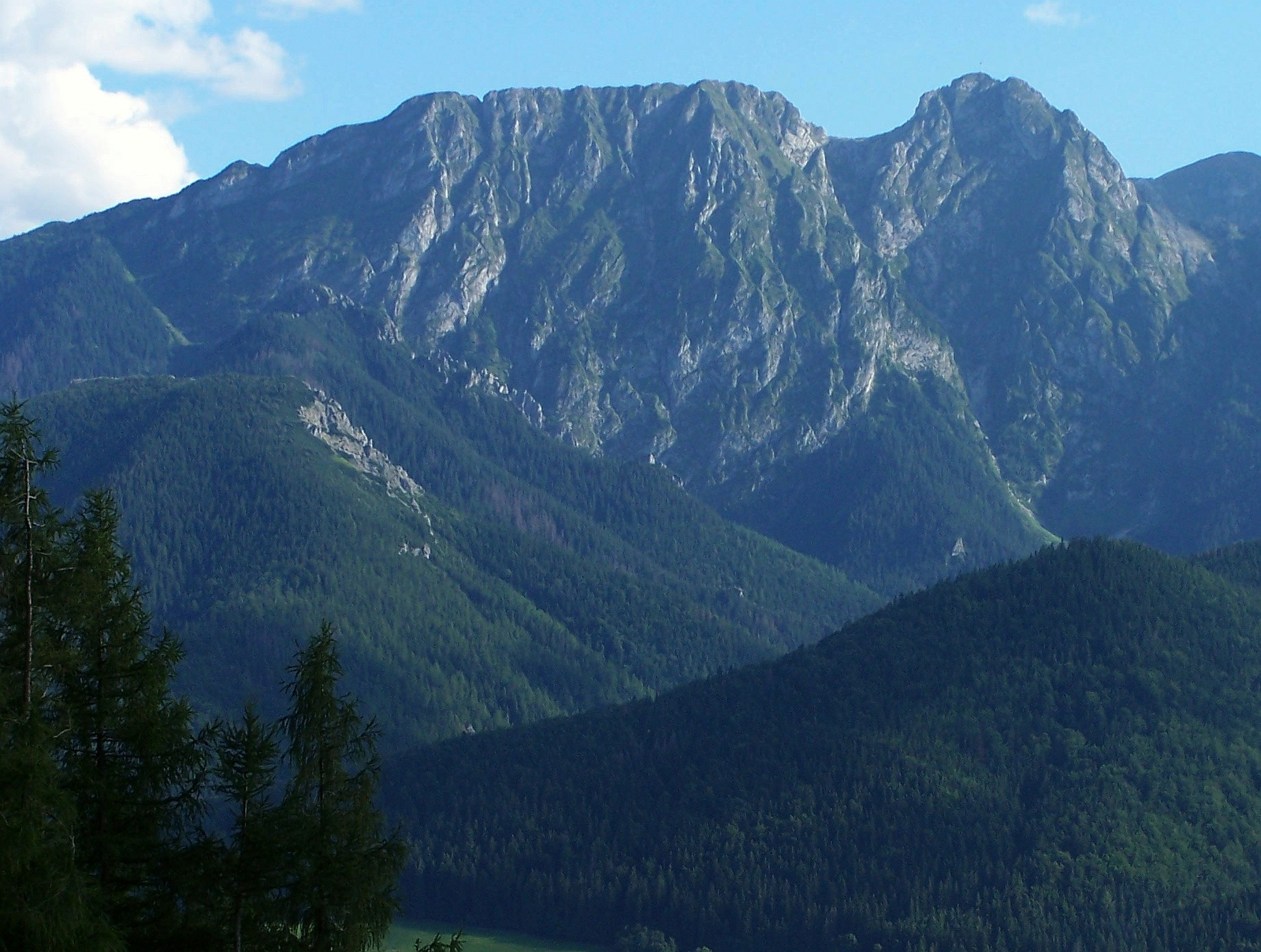 Giewont, Dolina Strążyska i Suchy Wierch. widok z Butorowskiego Wierchu